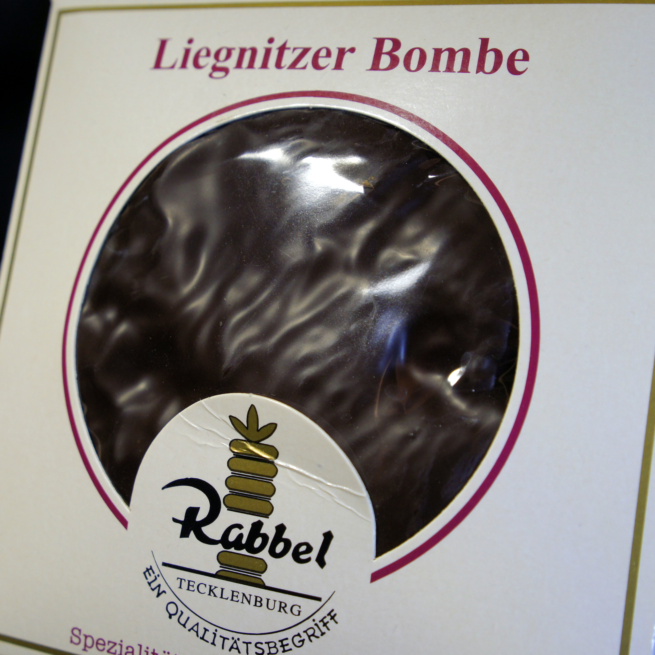 Liegnitzer Bombe, bomba legnicka - to smakołyk, którym zajadali i zajadają się mieszkańcy całych Niemiec. Bomba była wizytówką miasta. Na zdjęciu współcześnie produkowana z charakterystycznym wybrzuszonym okienkiem opakowania